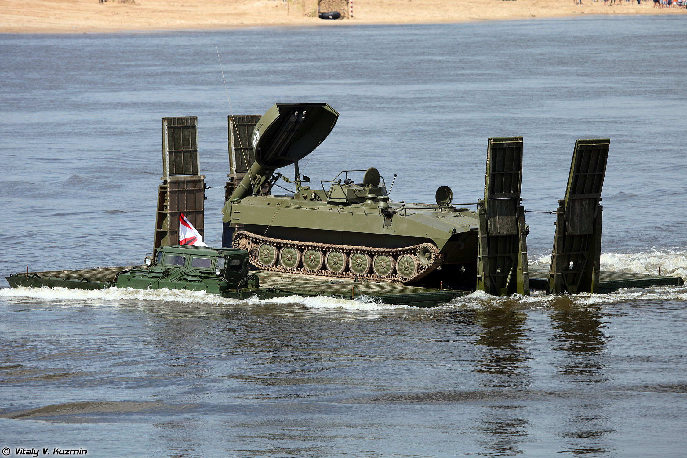 Паромно-мостовая машина ПММ-2М переправляет установку разминирования УР-77 Метеорит (UR-77 Meteorit mine clearing vehicle on PMM-2M self-propelled ferry vehicle)